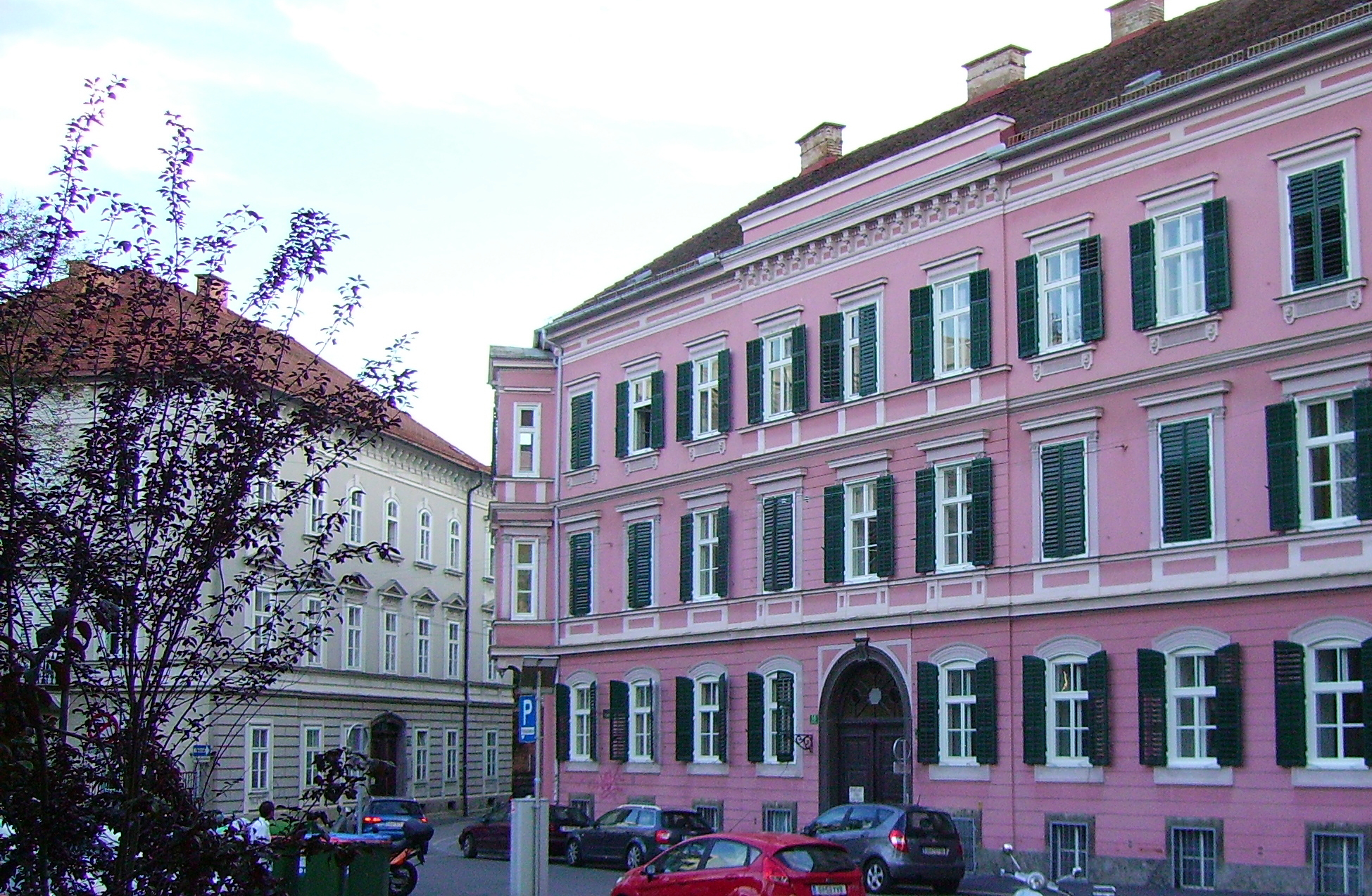 Graz, Wastiangasse (ehemals Kroisbachgasse 16)